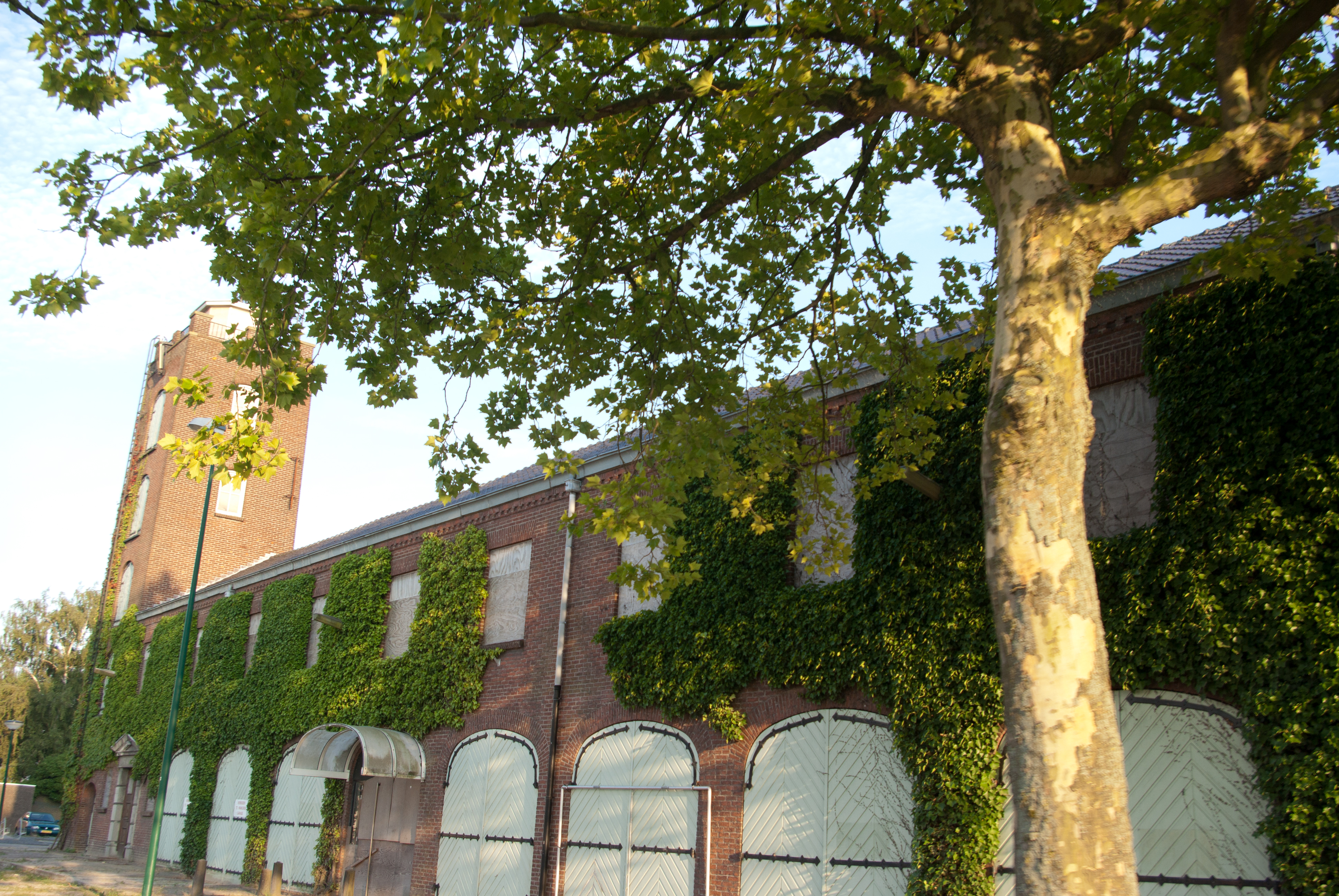 De oude brandweerkazerne in het centrum.